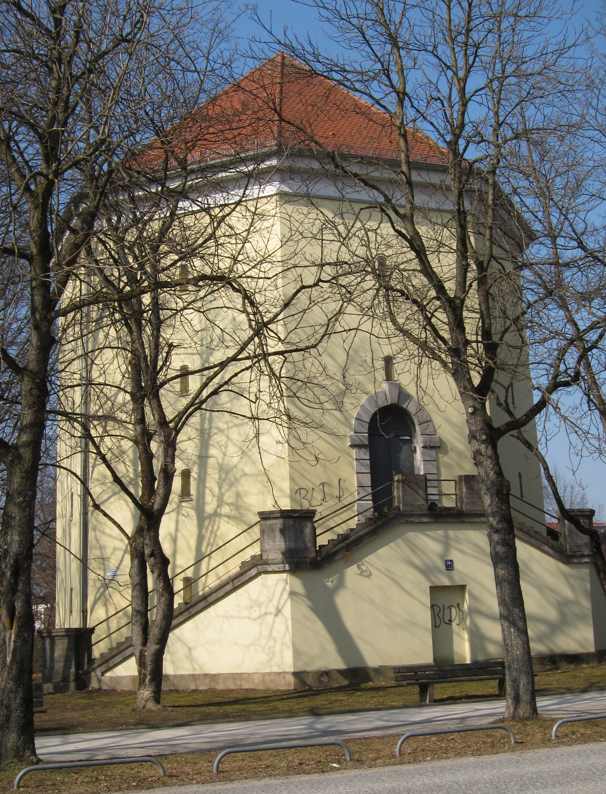 Sonnwendjochstraße 54a; Hochbunker, viergeschossiger Turm über achteckigem Grundriss mit Zeltdach und monumentaler Freitreppe, 1941 nach Plänen des städtischen Hochbauamtes (Stadtbaurat Karl Meitinger) als Luftschutzbau Nr. 7 errichtet; freistehend.